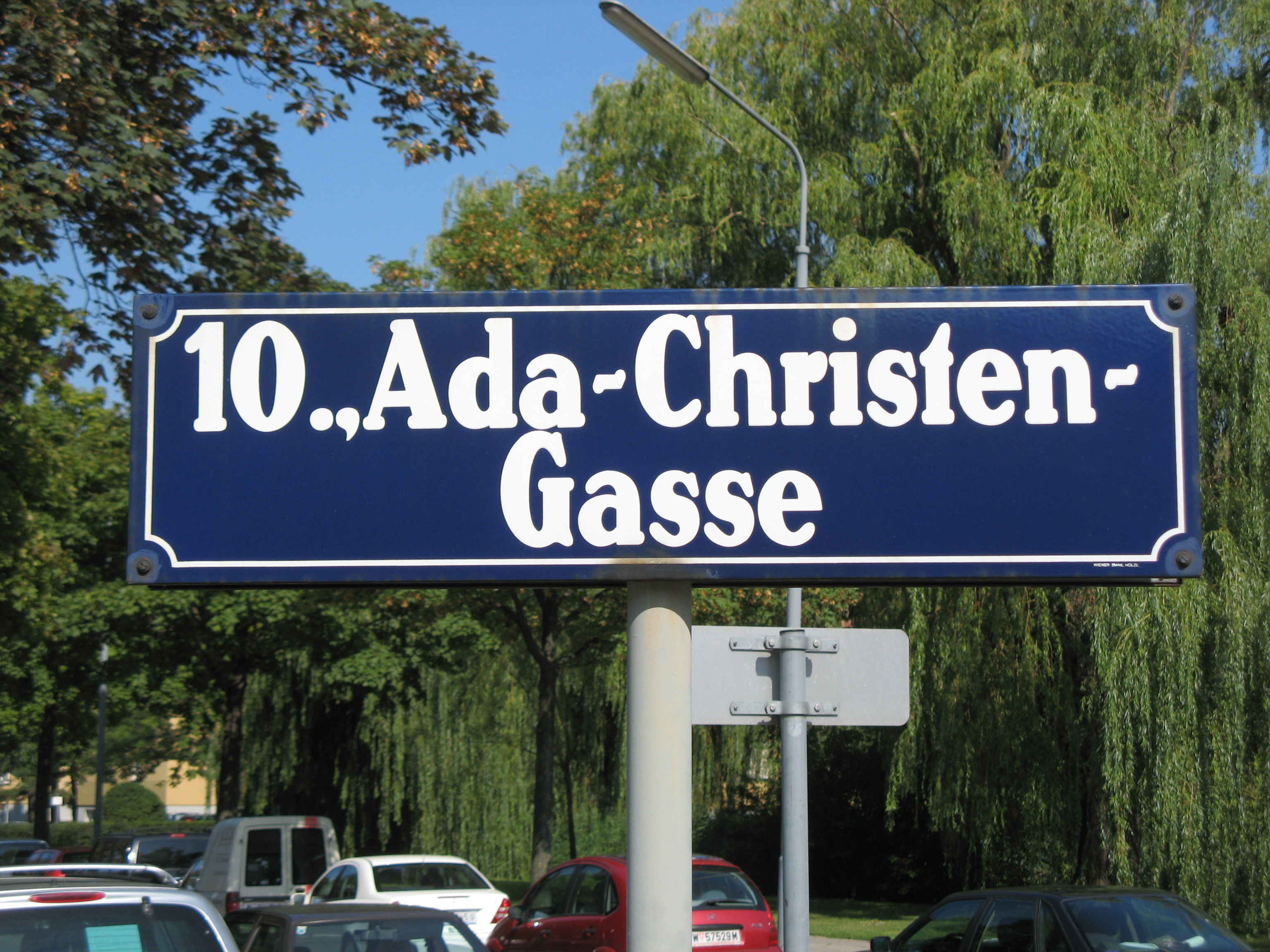 Straßentafel Ada-Christen-Gasse, Wien-Favoriten